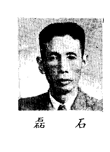 中文（中国大陆）: 制憲國民大會代表